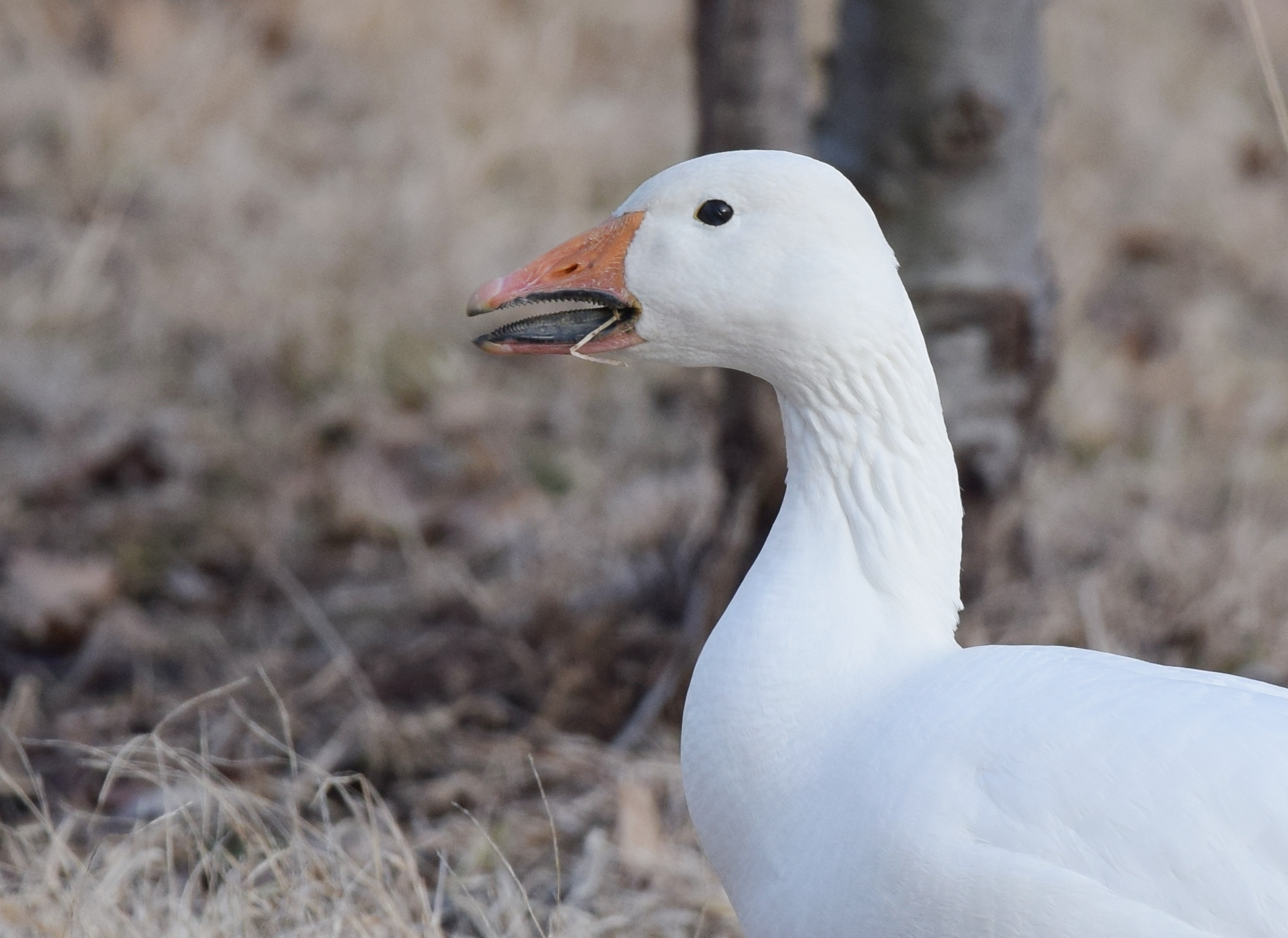 Carondelet Park 1/24/16